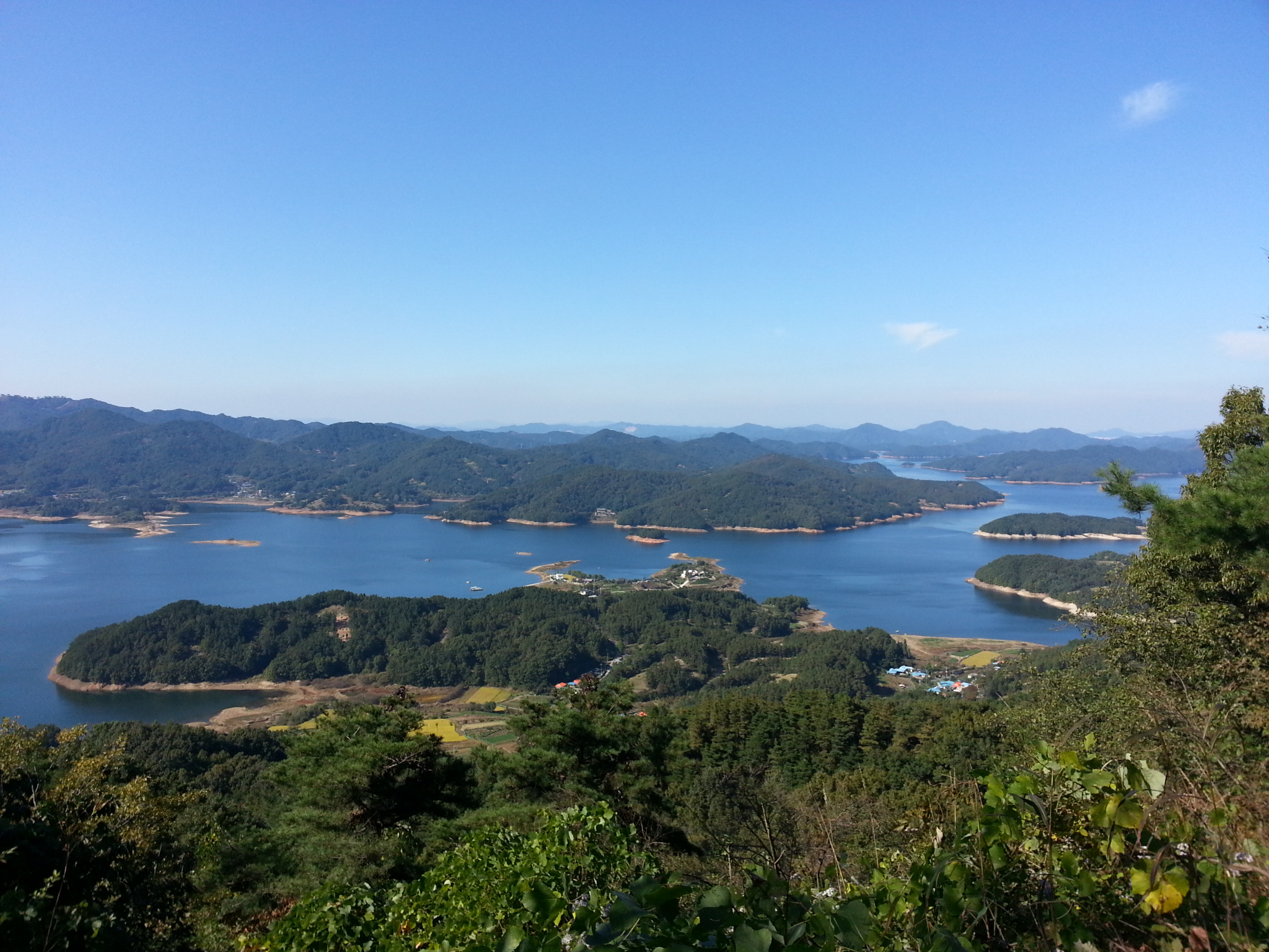 대청호오백리길 5구간_2